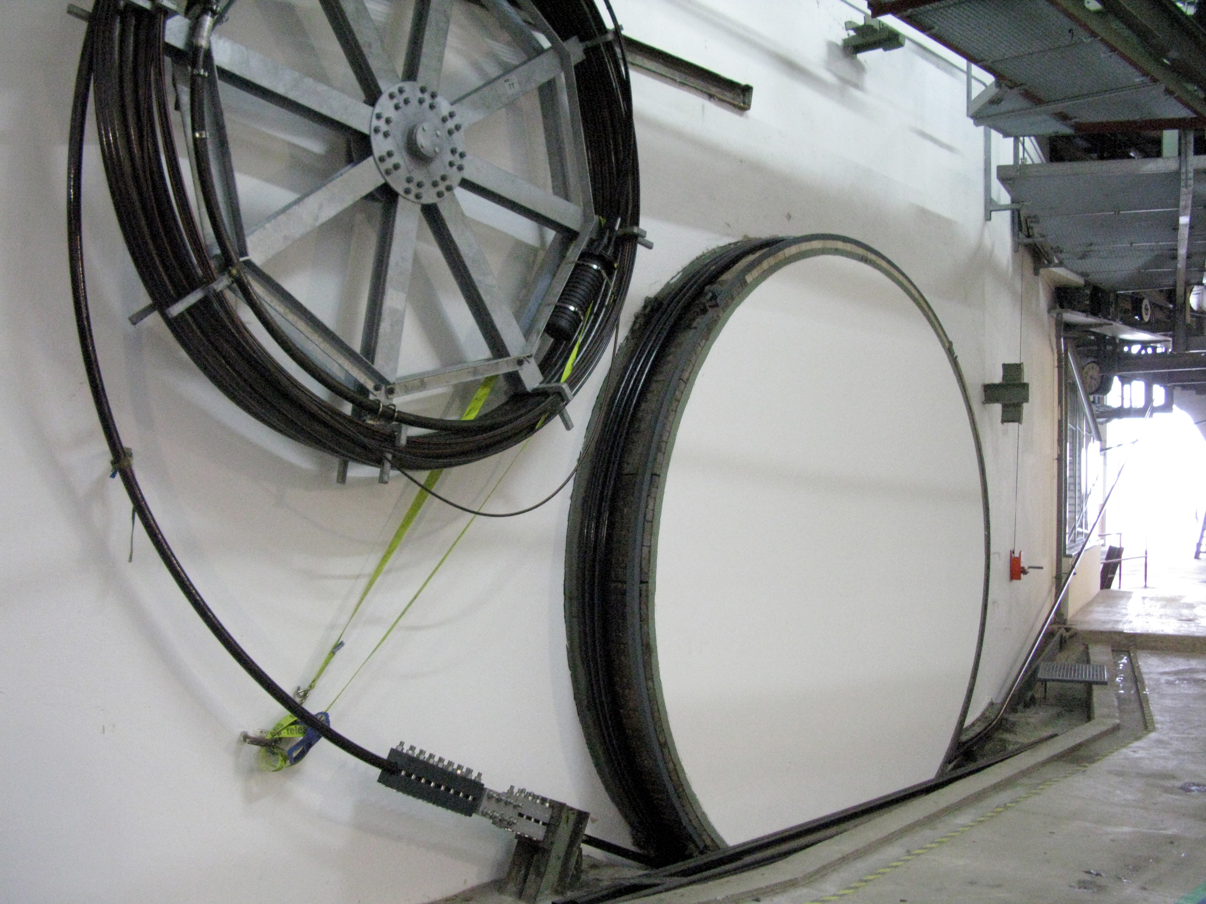 Bergstation der Freiburger Schauinslandbahn, Verankerung eines Tragseils